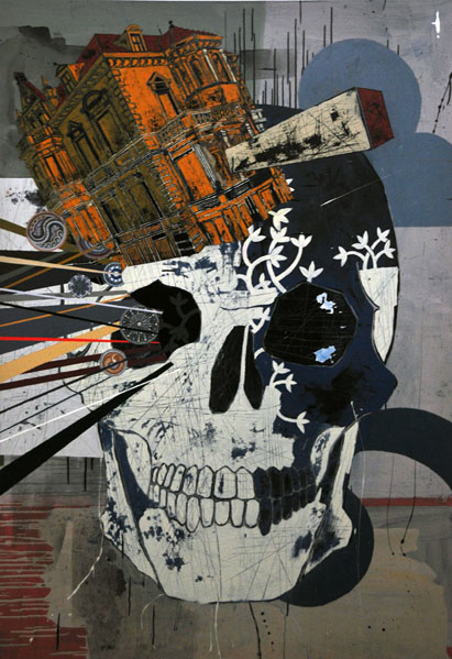 Cuadro de Juan Miguel Pozo.